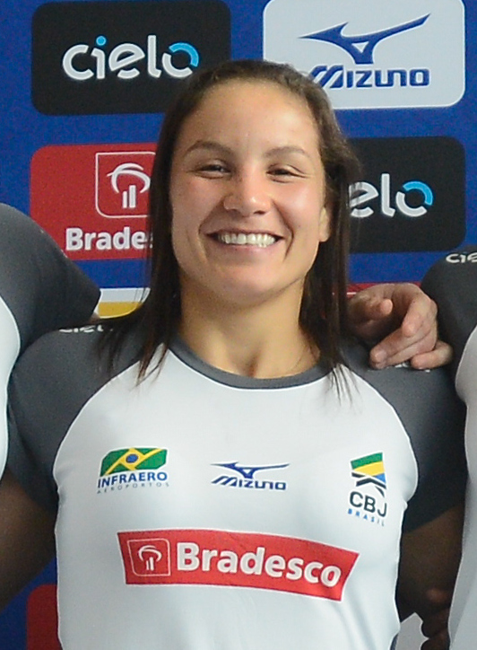 Rio de Janeiro - Equipe feminina convocada pela Confederação Brasileira de Judô (CBJ) para disputar os Jogos Olímpicos Rio 2016, posa para fotos (Tânia Rêgo/Agência Brasil)